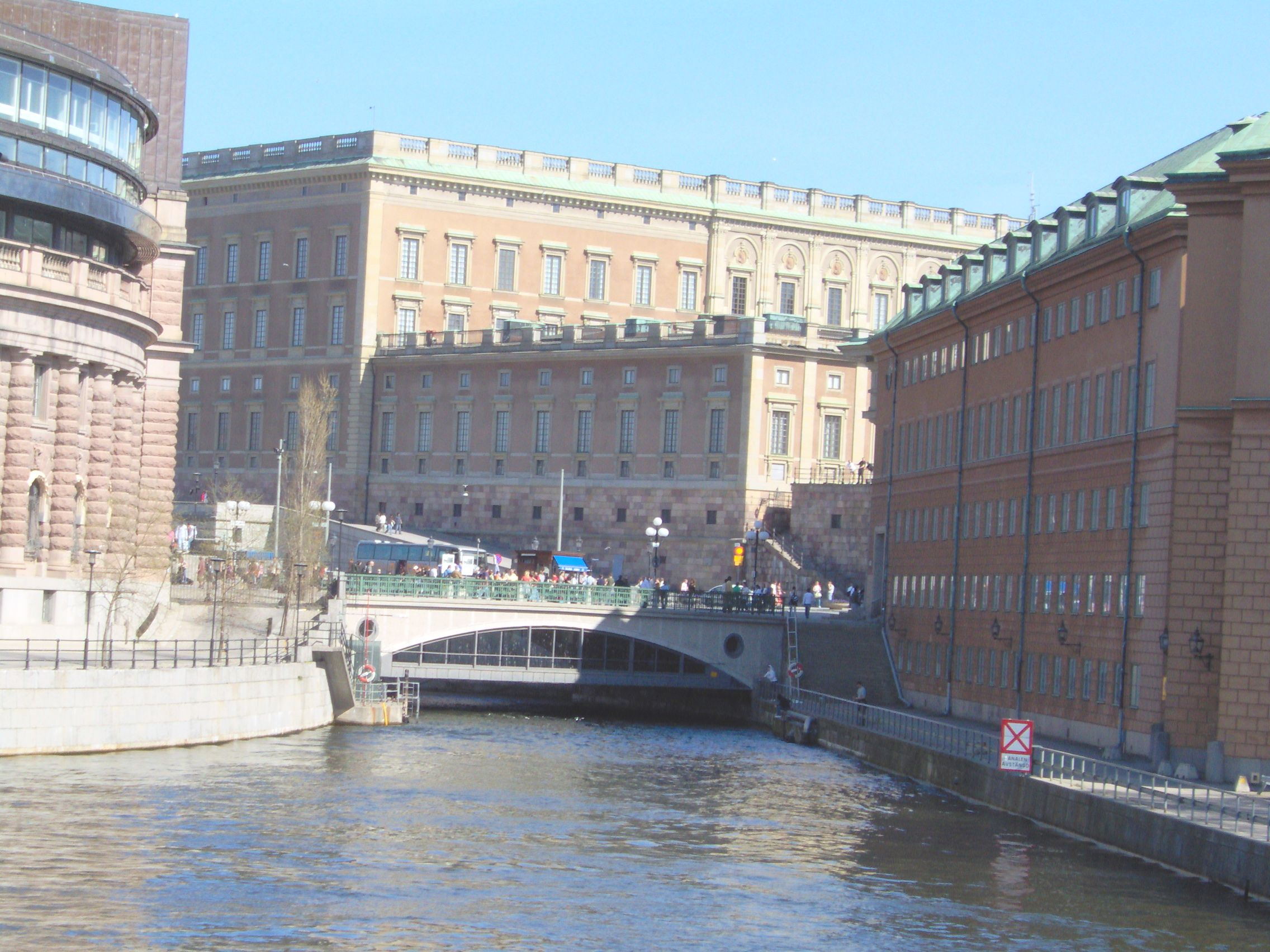 Stallbron över Stallkanalen, Stockholm, Sweden. 2006